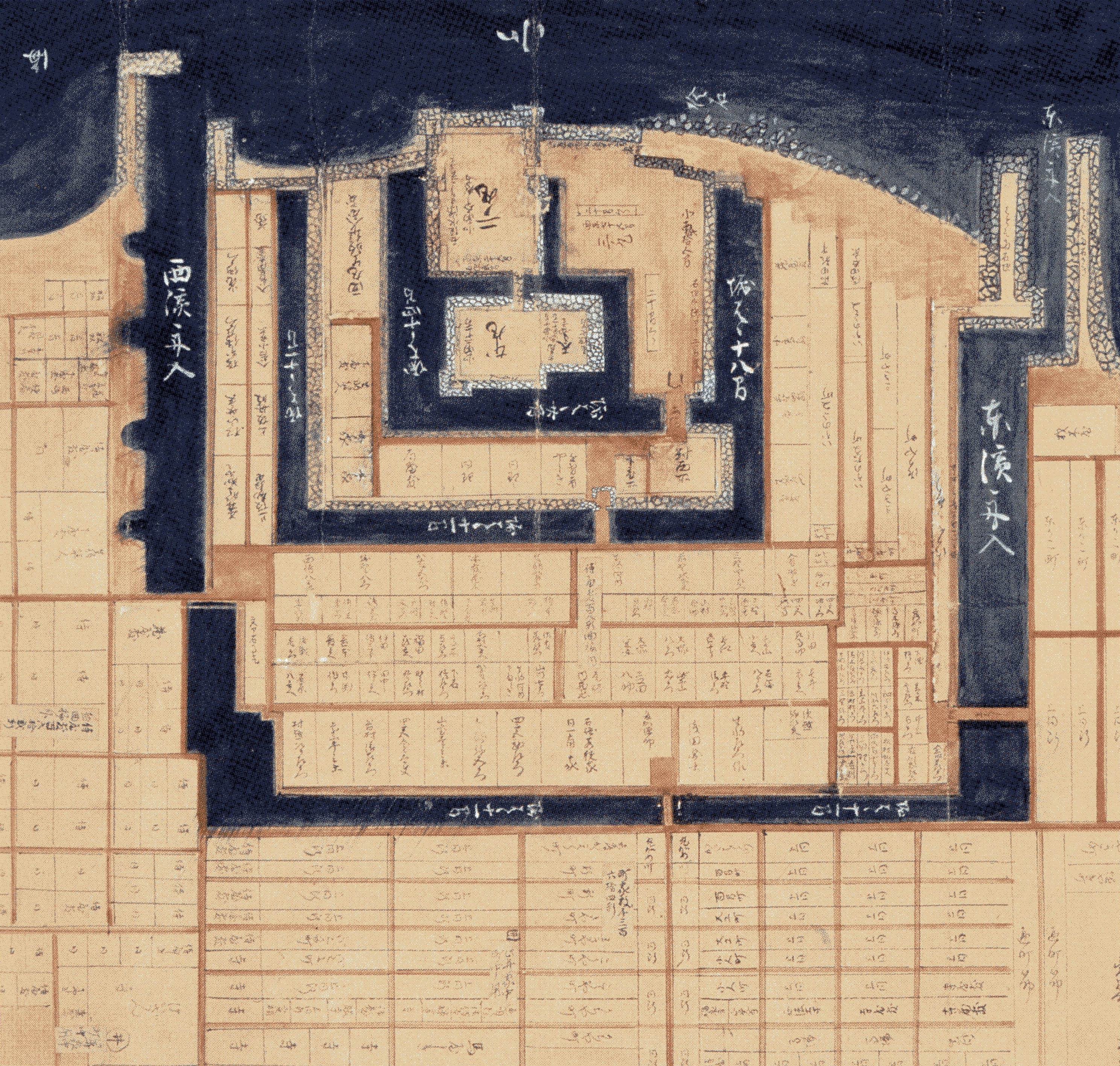 生駒家時代讃岐高松城屋敷割図